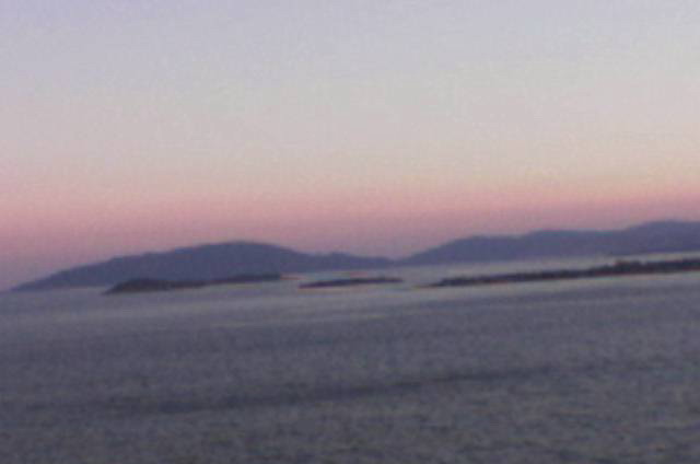 Fotoğraf tarafımdan çekilmiş ve vikipedi'ye yüklenmiştir. Burak Onurlu